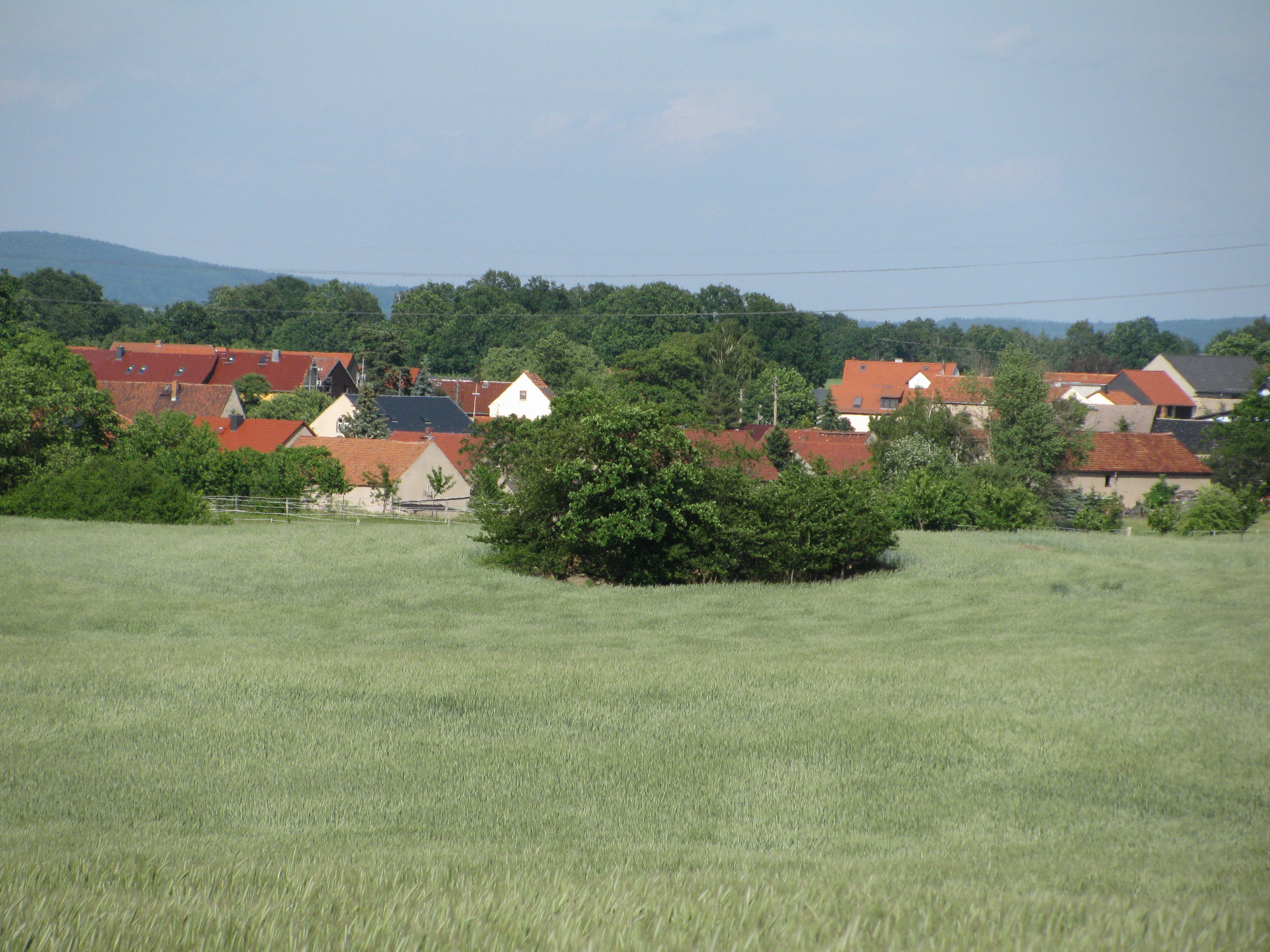 Blick von der gleichnamigen Autobahnabfahrt auf Marsdorf, Ortsteil von Dresden